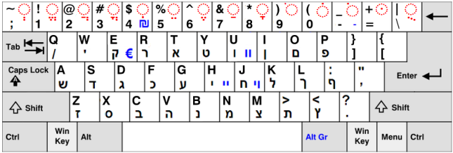 Windowsのヘブライ語キーボード